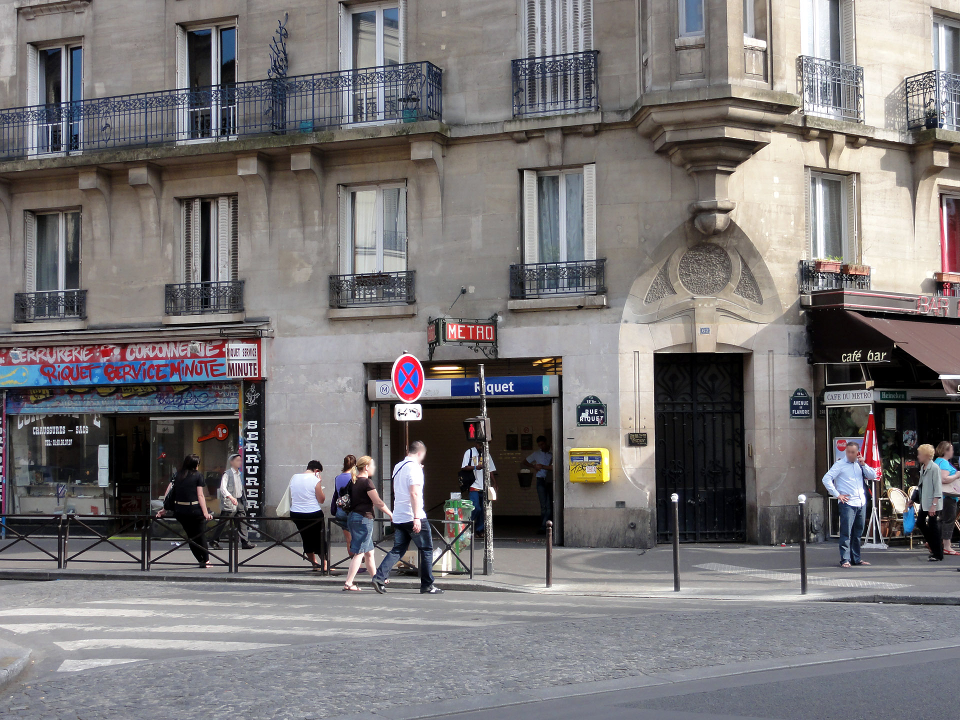 Entrée de la station Riquet de la ligne 7 du métro de Paris, France.